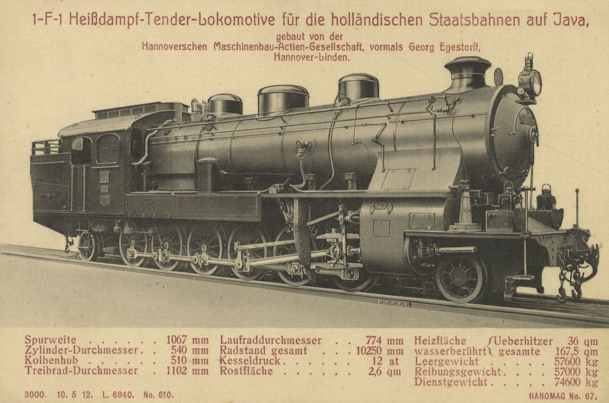 1-F-1 Heißdampf-Tender-Lokomotive für die holländischen Staatsbahnen auf Java